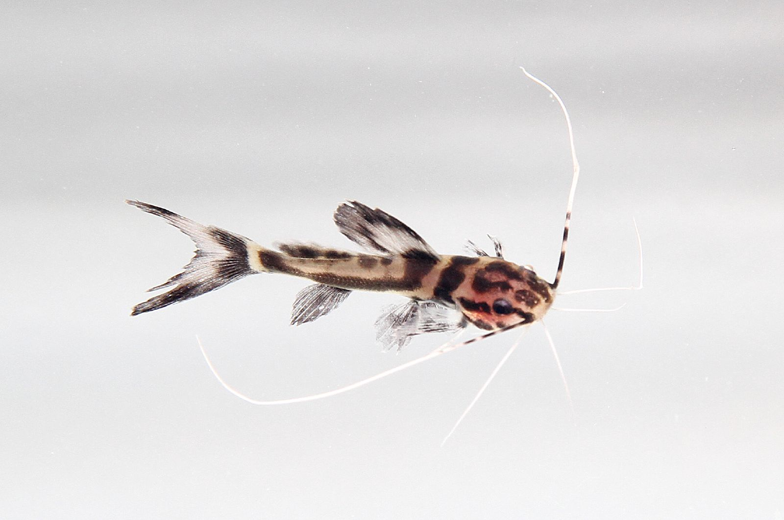 Leiarius marmoratus (juv)